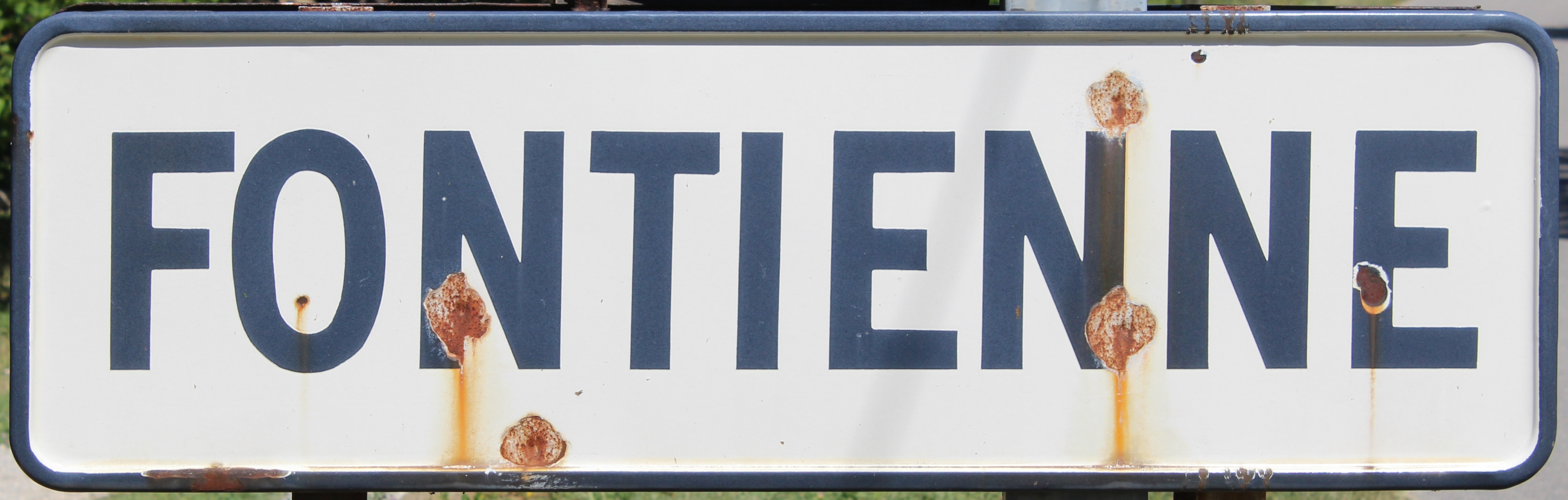 Panneau d'entrée dans Fontienne depuis Revest-Saint-Martin.